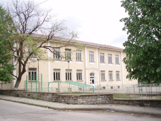 Училището в село Градница, област Габрово.